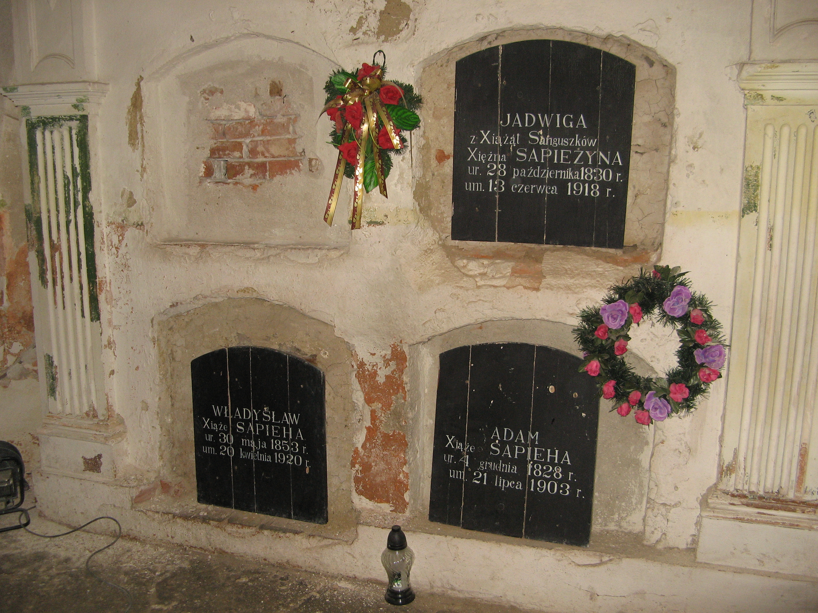 Grobowce w zamku w Krasiczynie.